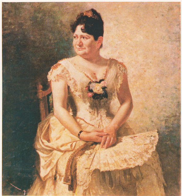 Retrato de Antonia Moreno de Cáceres, por Carlos Baca-Flor.